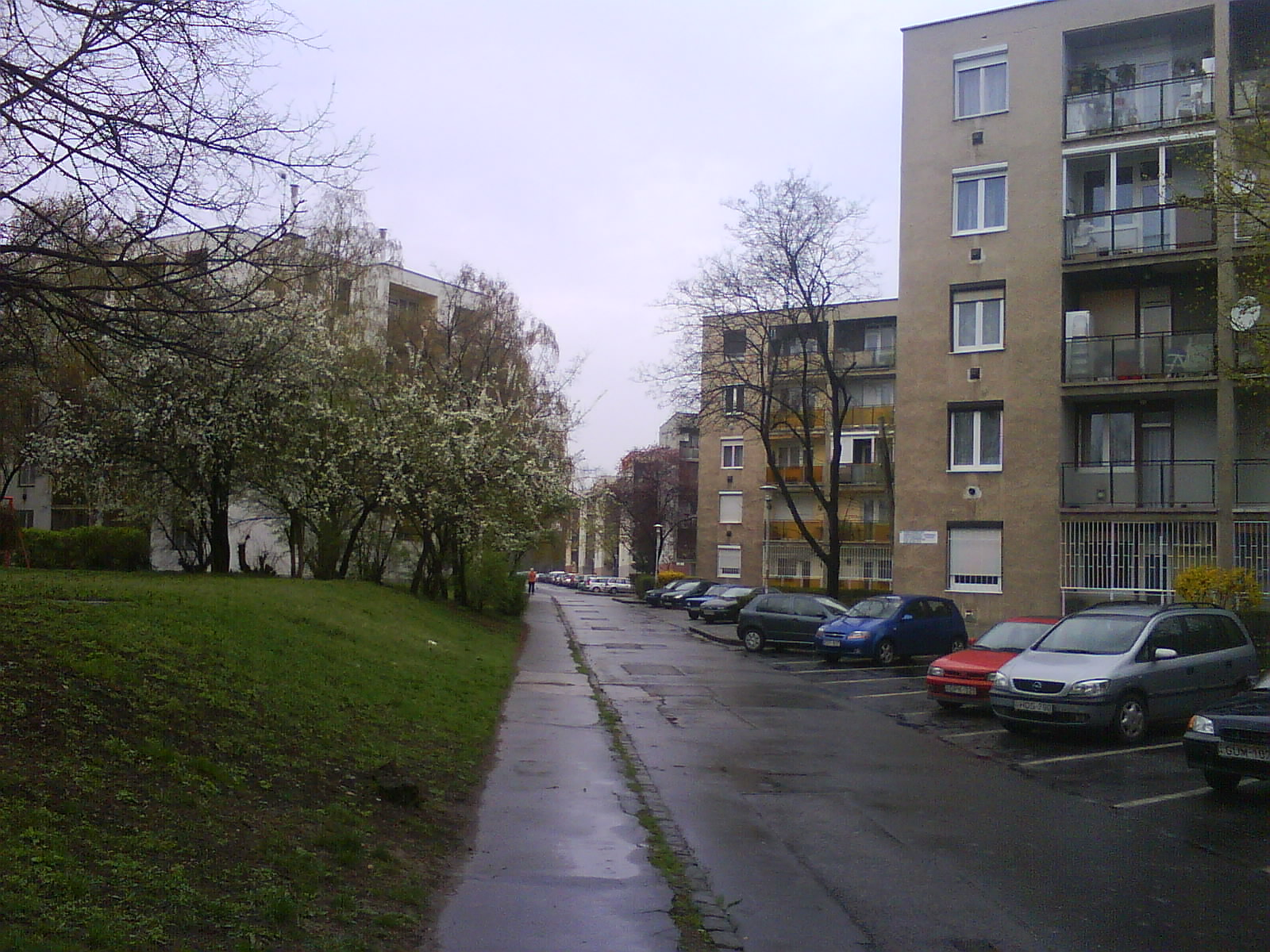 Közel az Óhegy parkhoz (Kőbánya, Budapest X. ker.)